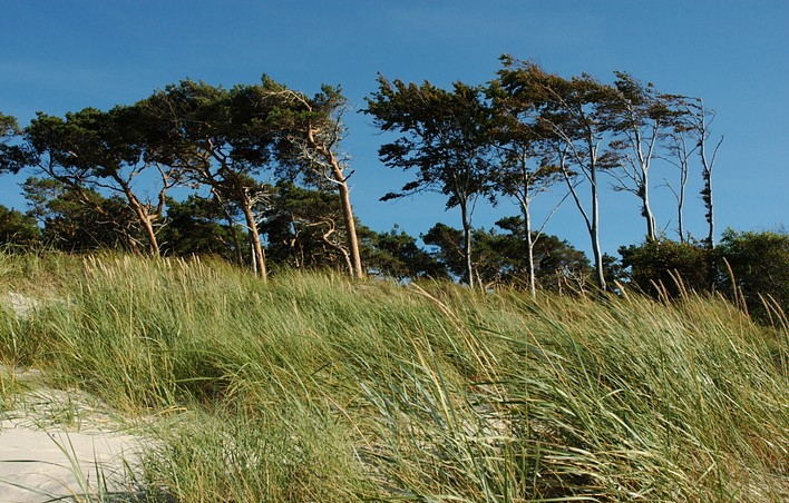 Windflüchter auf Darß vom Strand aus fotografiert - in Richtung Born.